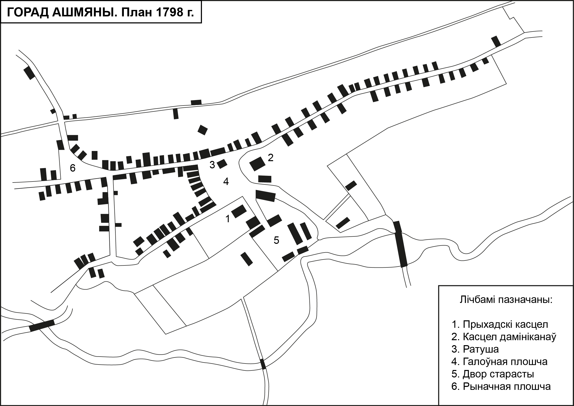 План города Ошмяны 1798 г.